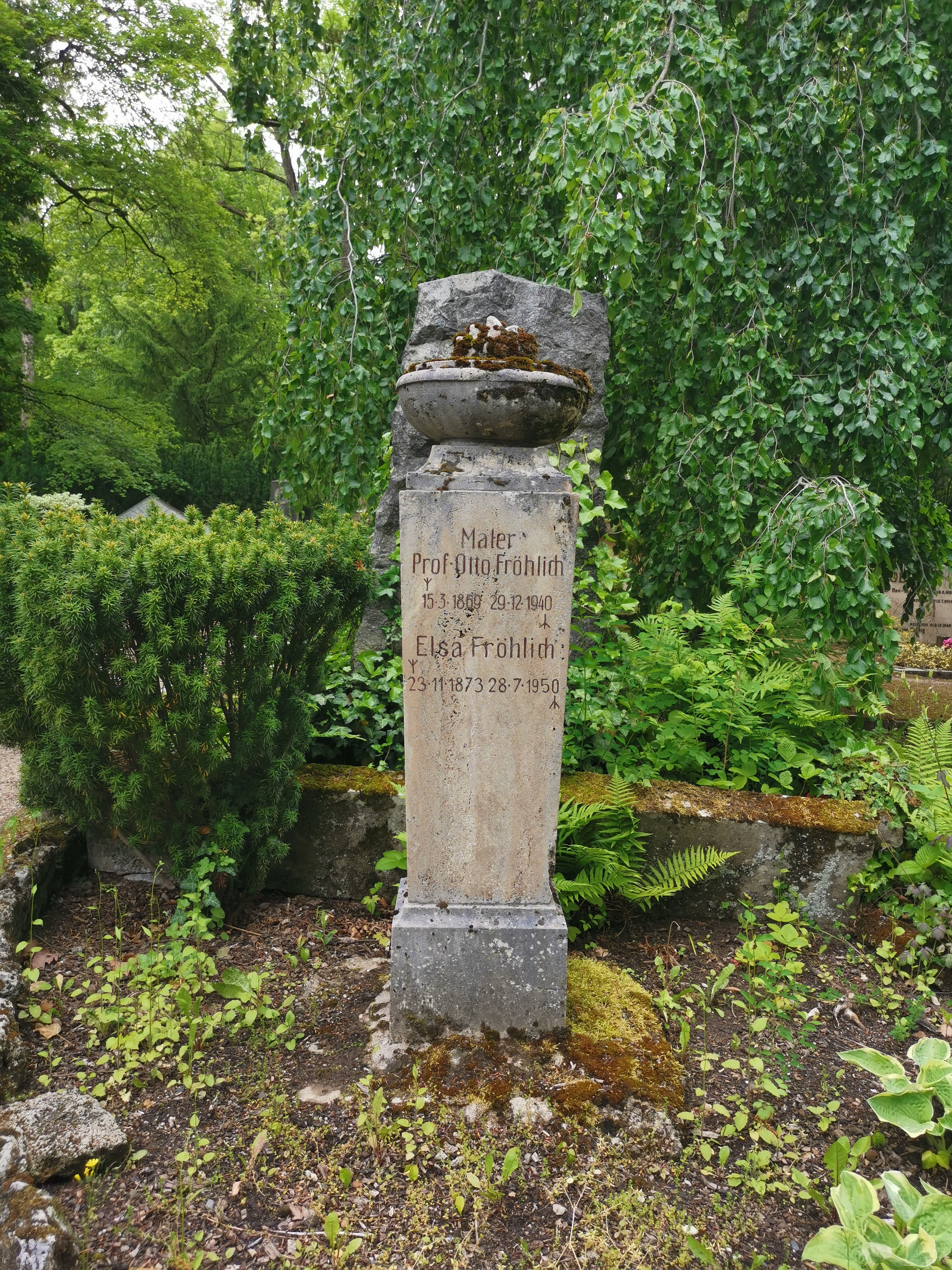 Grabstätte Otto Fröhlich; Historischer Friedhof Weimar